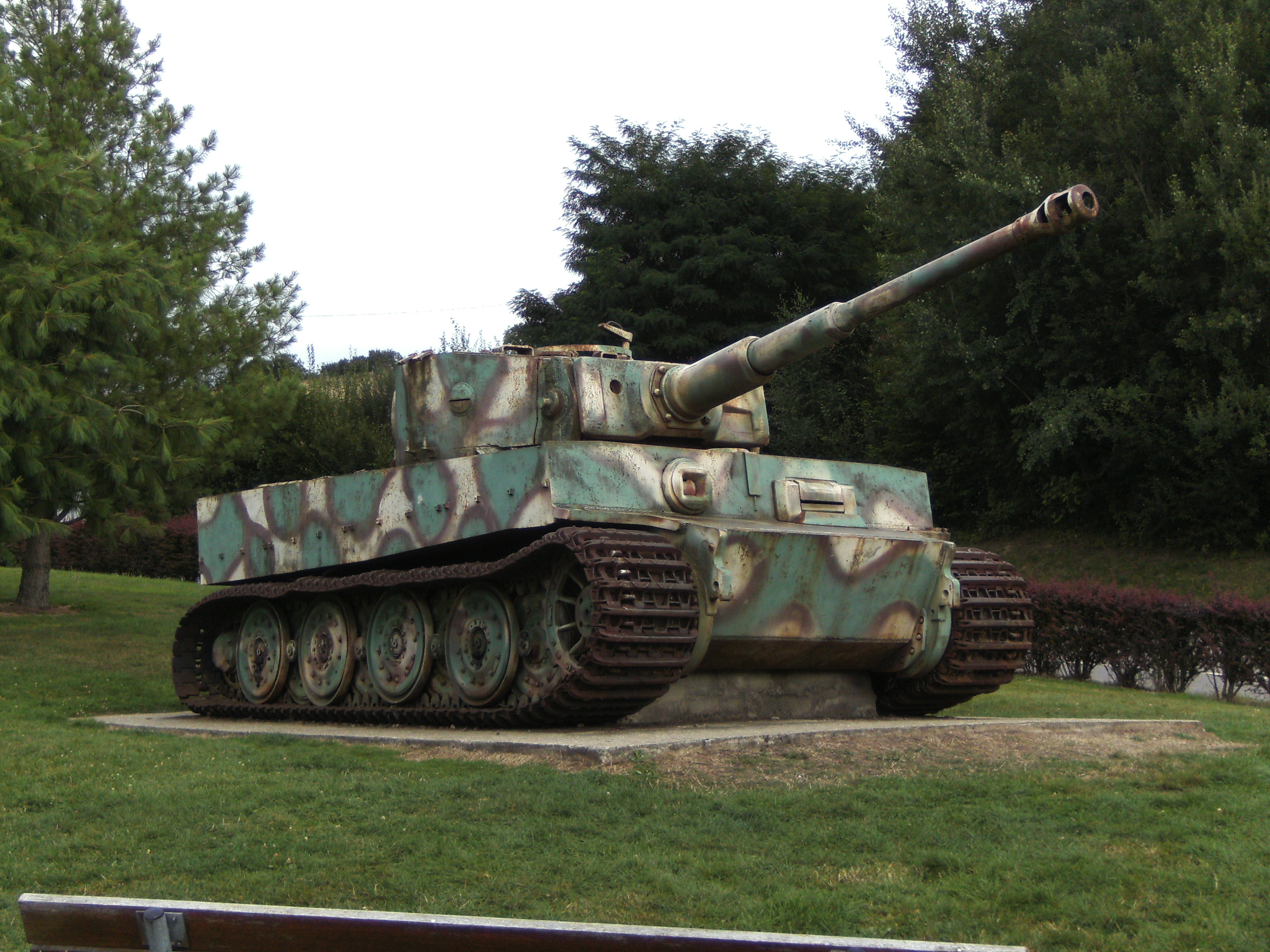 Vimoutiers (Orne - France) - Char Tigre de Vimoutiers, un char Tigre allemand abandonné en aout 1944 lors de la fermeture de la poche de Chambois (bataille de Normandie). Restauré dans les années 1970, il a été classé au titre d'objet, monument historique en 1975